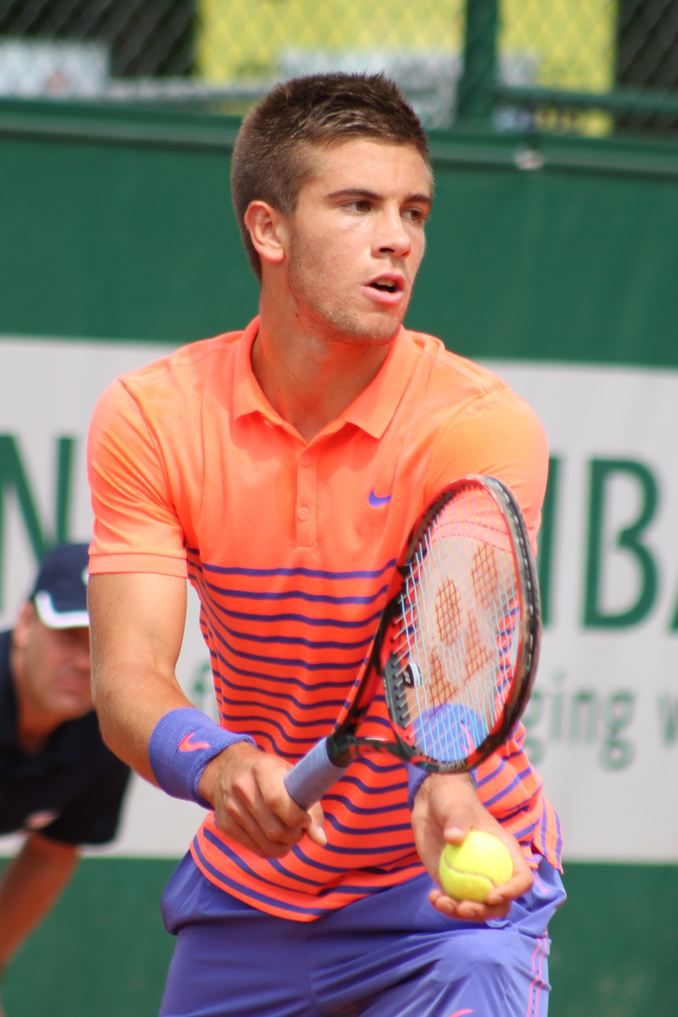 Coric RG15 (11)